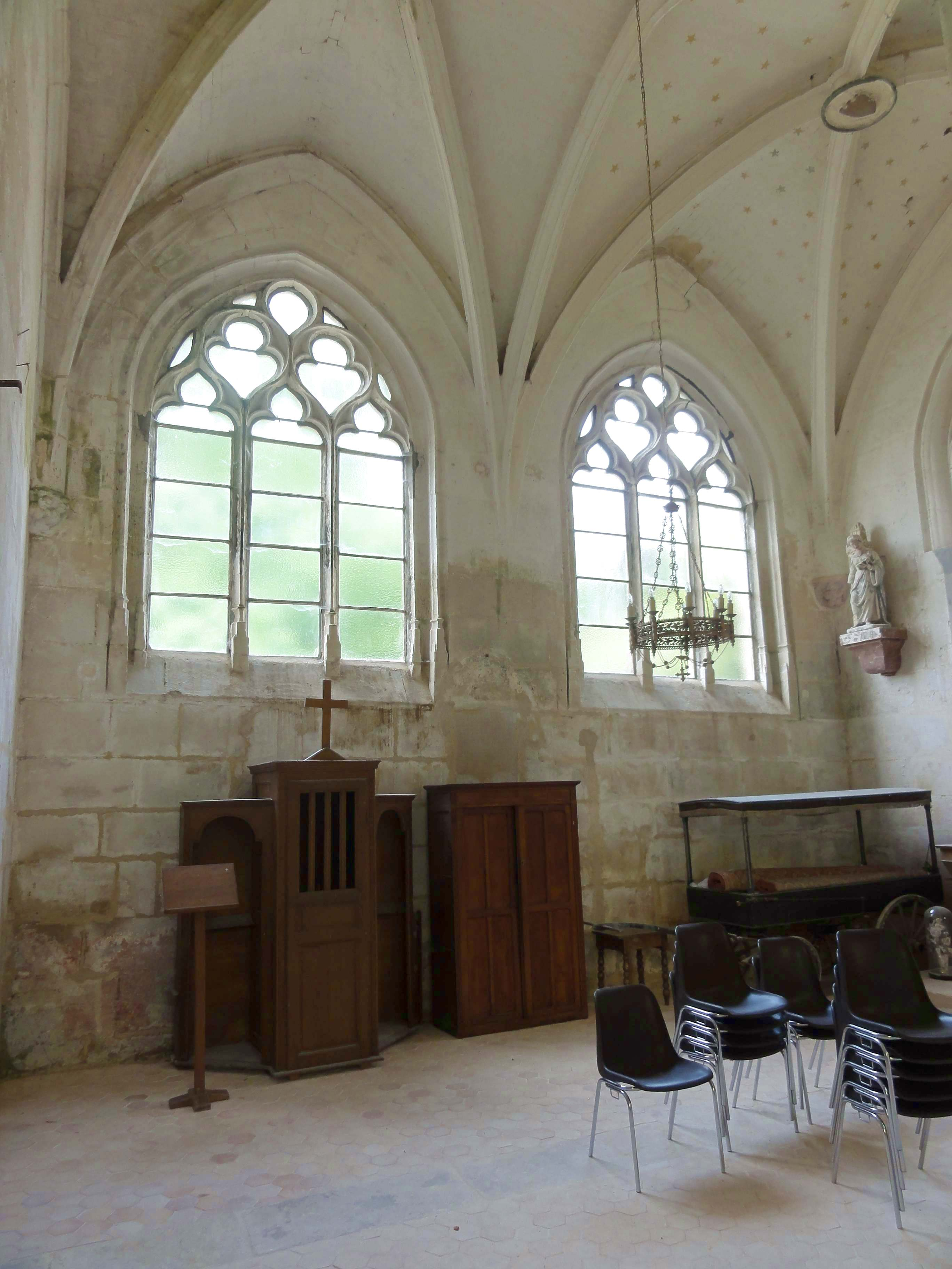 Intérieur de l'église (voir titre).